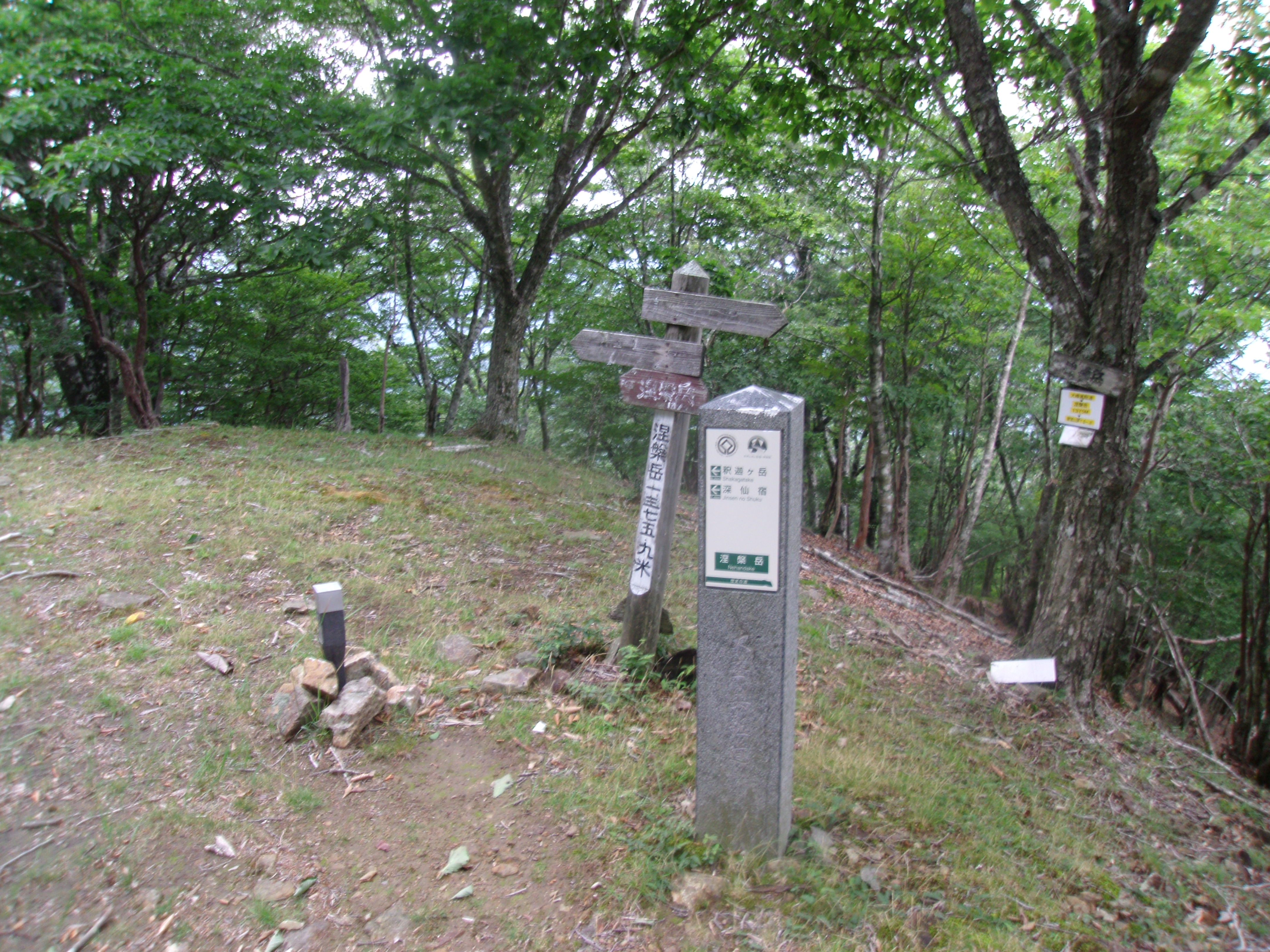 大峯奥駈道第24靡「涅槃岳」